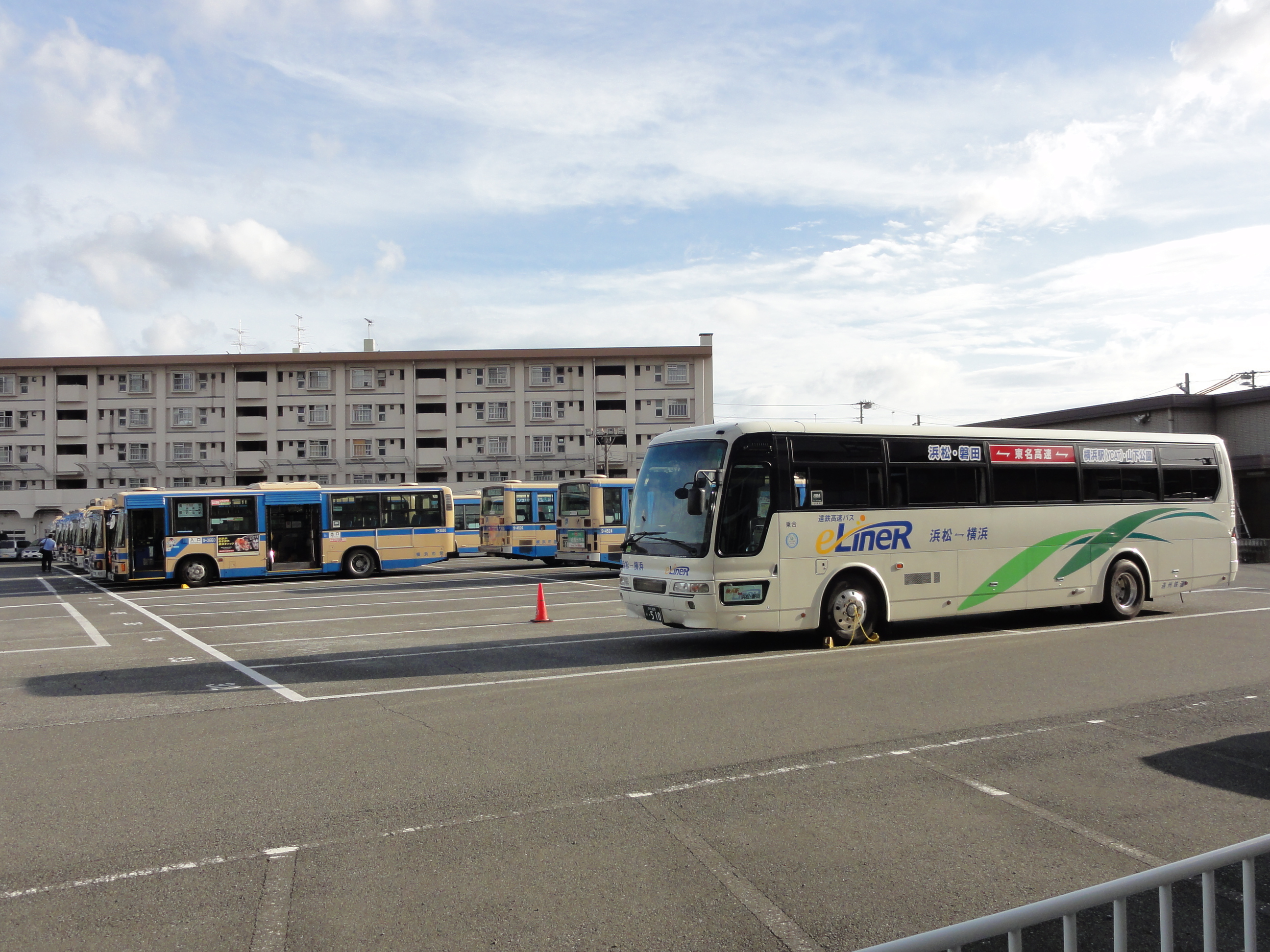 横浜市営バス滝頭営業所